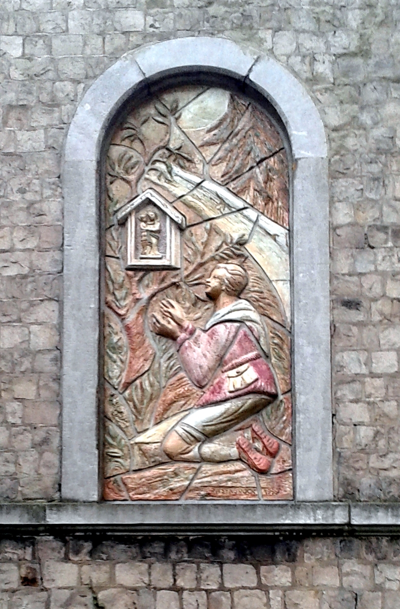 Wandrelief an der Außenwand der Apsis der Wallfahrtskirche Moresnet Chapelle; Künstler Frans Griesenbrock